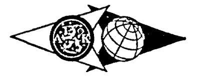 esitelogo